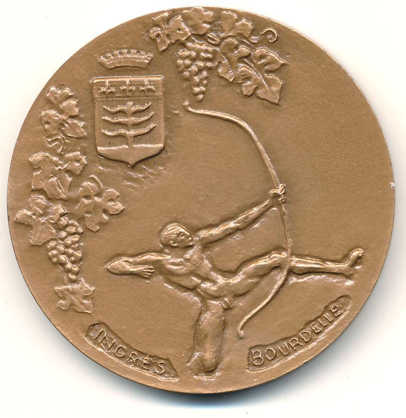 Médaille bronze, ville de Montauban, revers Héraklès d'Antoine Bourdelle